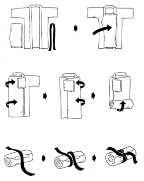 Como doblar un karate gi